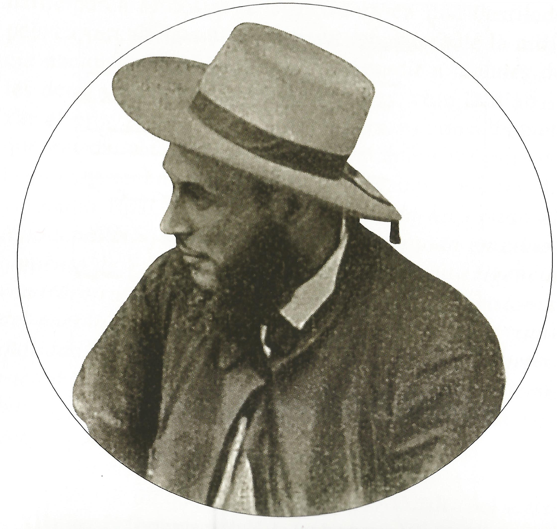 Sebastià Badia i Gibert, alcalde electe de Badalona després de la revolució de 1868.